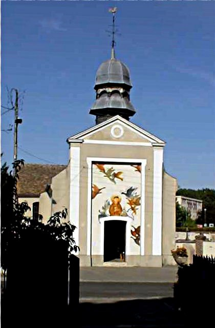 Église Saint-Baudile de Brou-sur-Chantereine avant le ravalement de 2014. Seine-et-Marne, France.